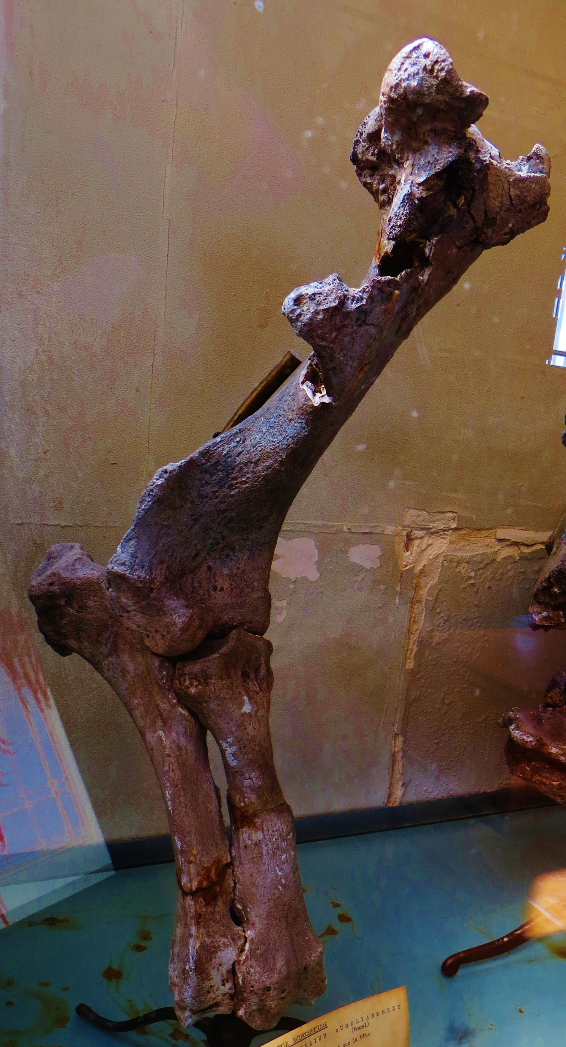 Fossil of Diaceratherium, an extinct mammal - Took the photo at Musee d'Histoire Naturelle, Paris